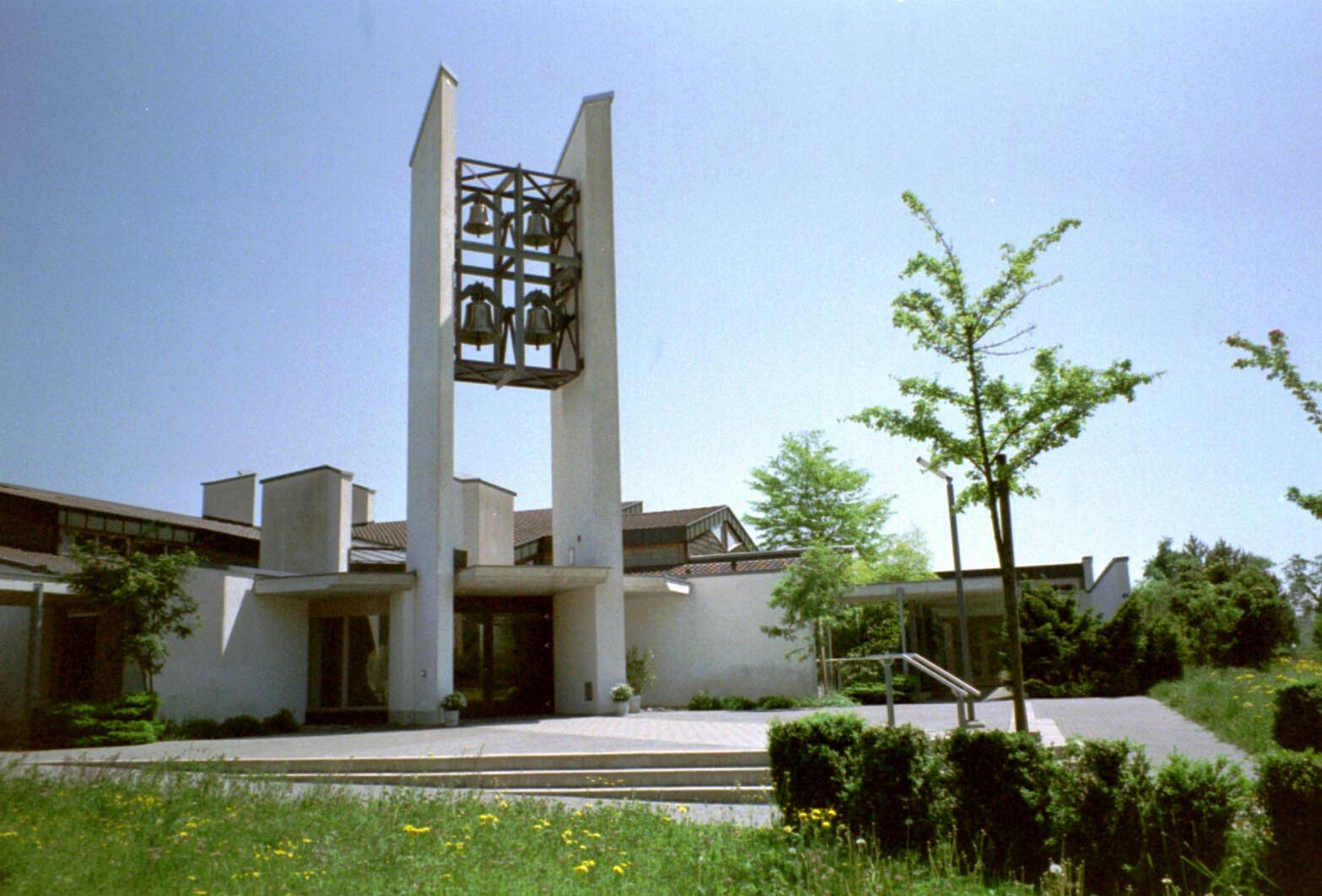 Römisch-katholische Pfarrkirche St. Katharina von Siena Fällanden, Turm in der ursprünglichen Gestalt